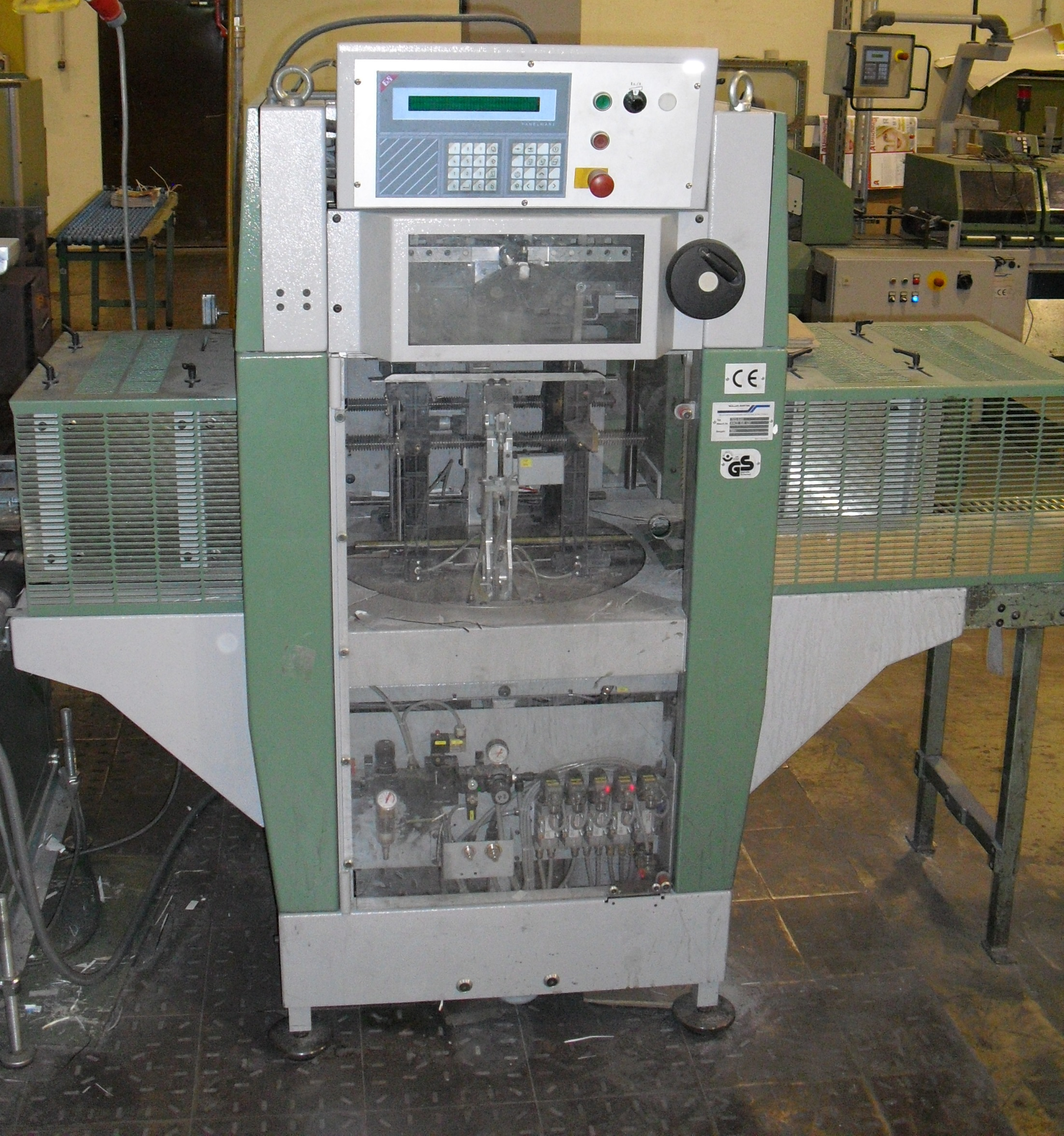 Kreuzleger, Peripheriegerät Druckerei Buchbinderei